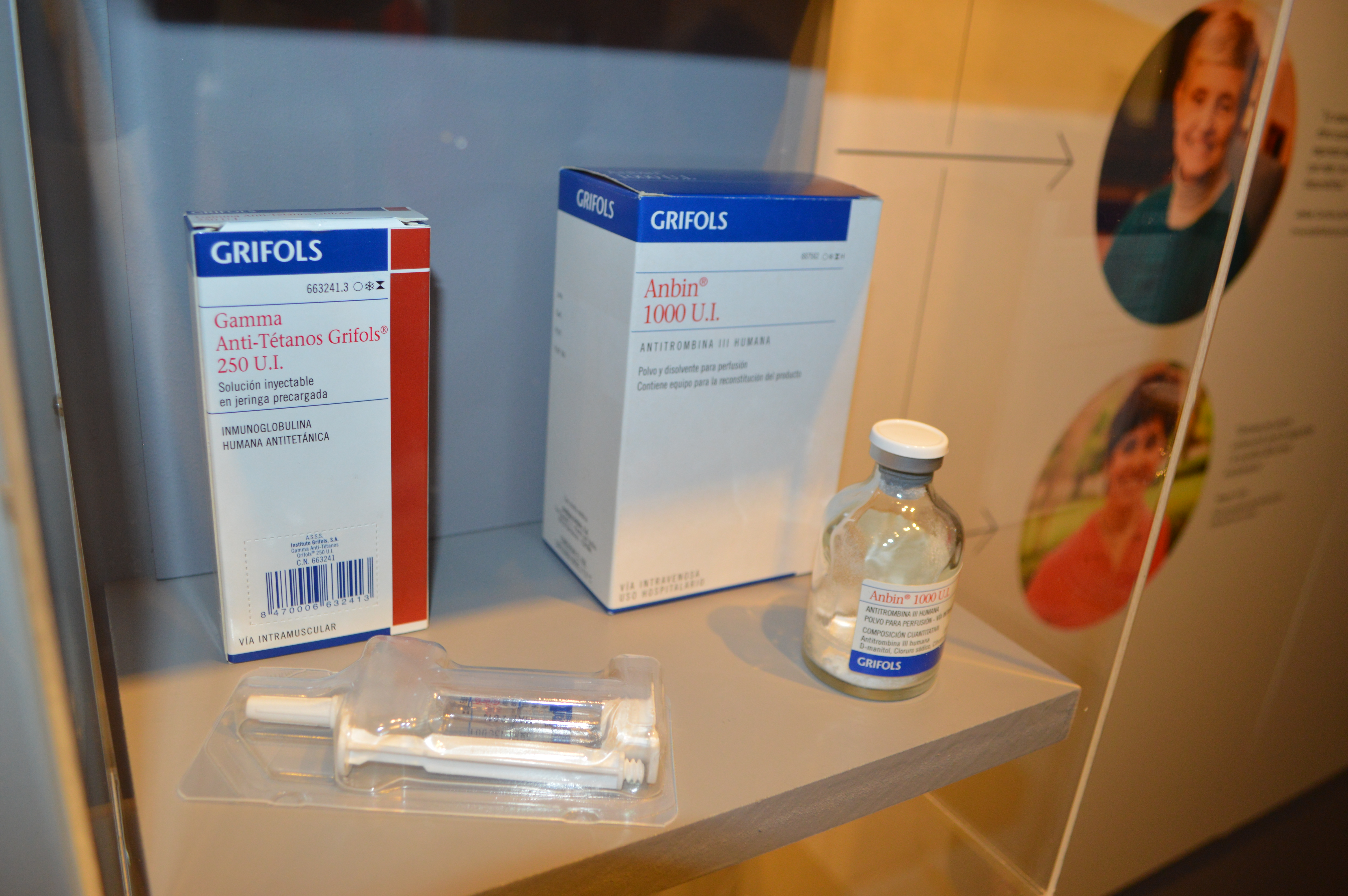 Productes antitetànics i antitrombina de Grifols.